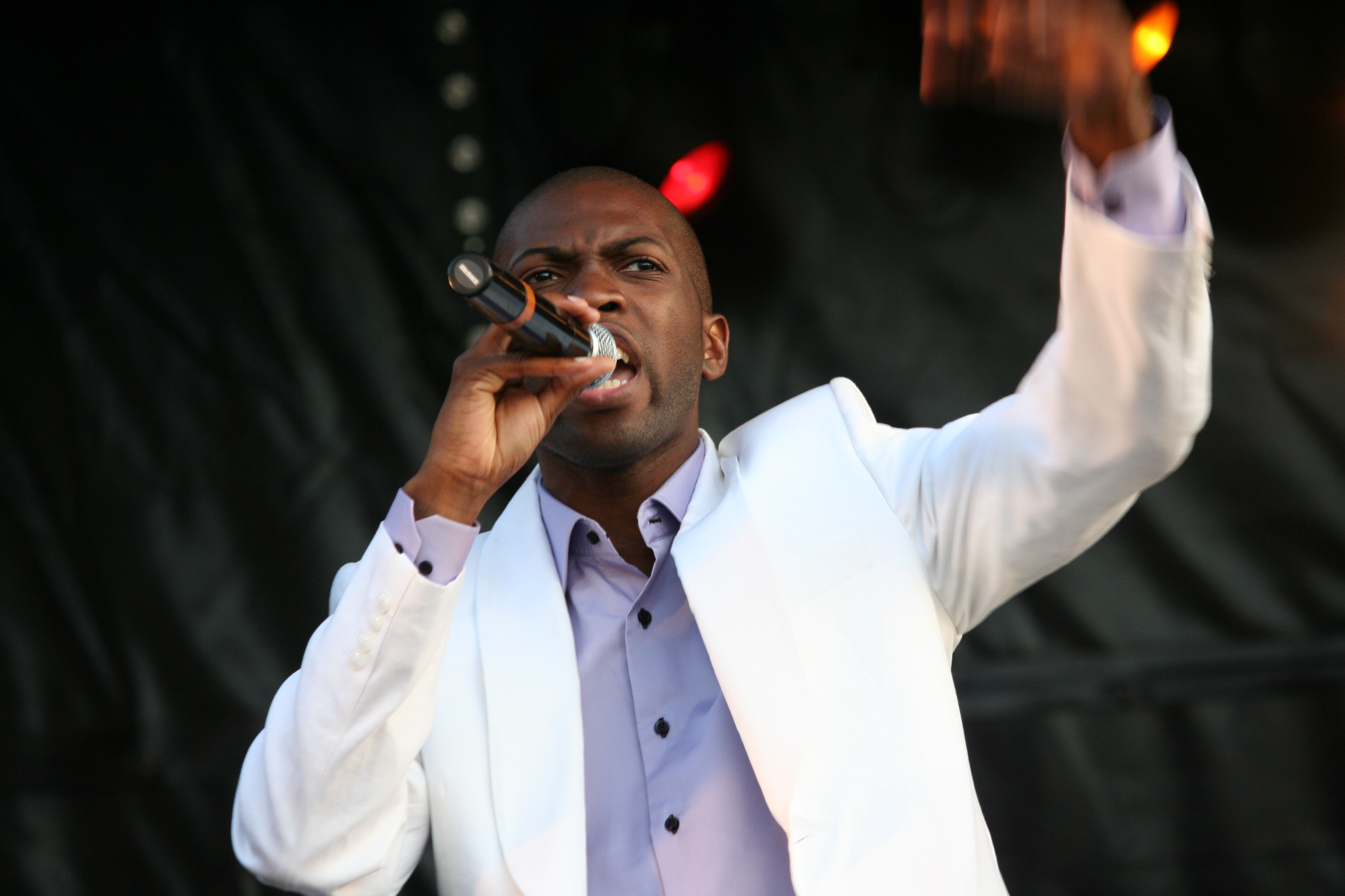 Fête de la Musique à Saint-Lô - France : Yannick